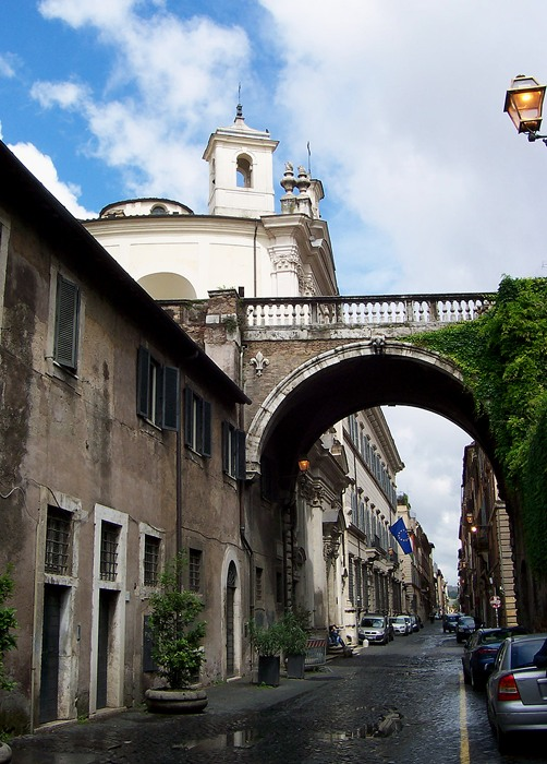 Roma - Via Giulia